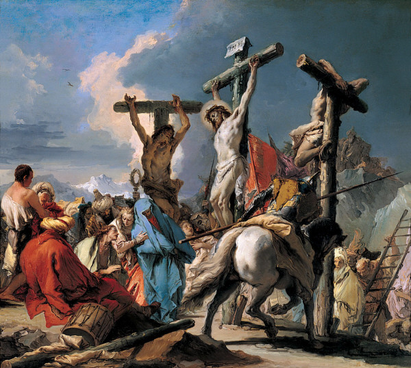 Crucifixion